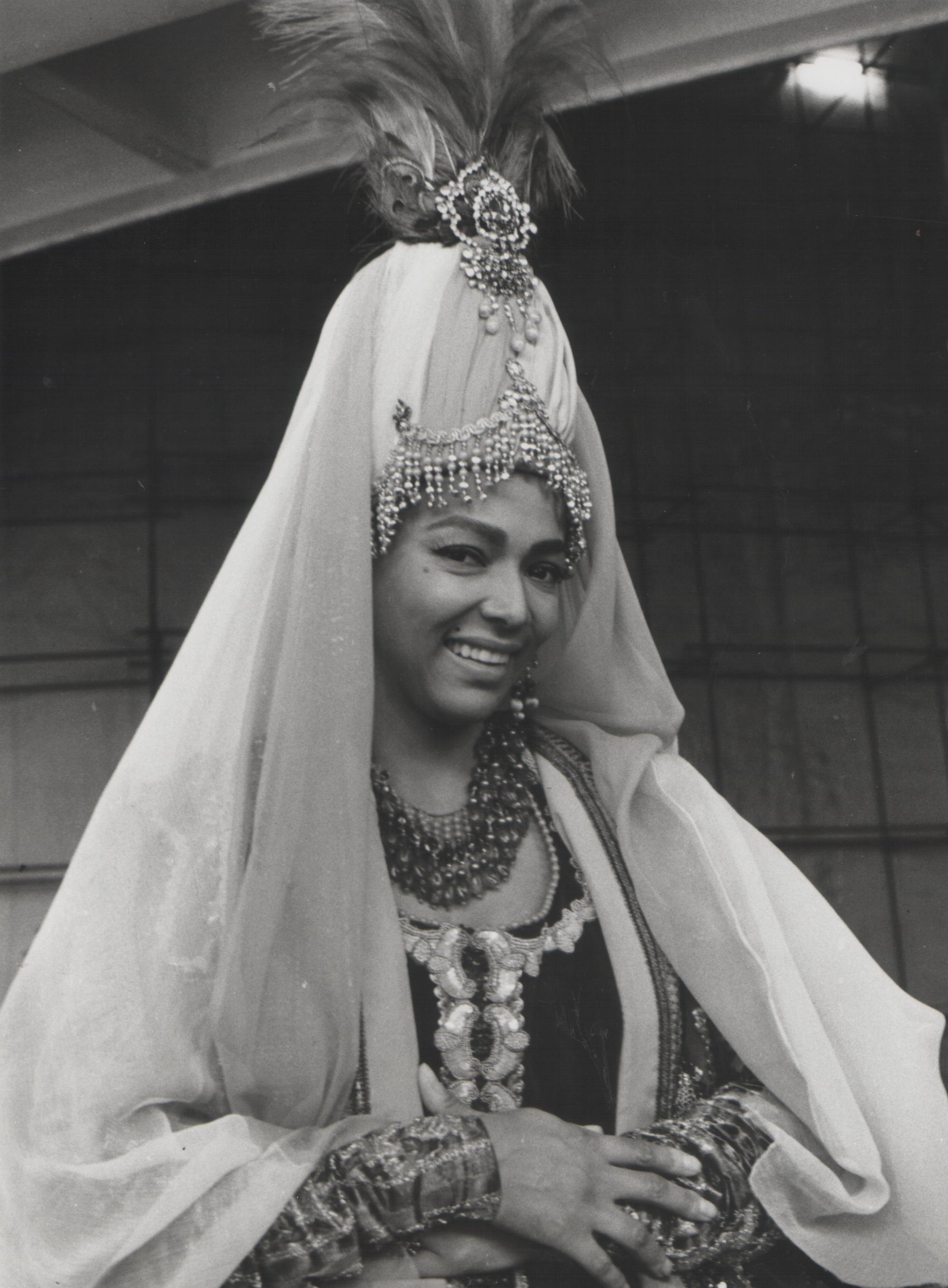 Stevan Kragujević: Doroti Dendridž u Beogradu 1962, Snimanje filma "Čudesne pustolovine Marka Pola" (po odobrenju ćerke Tanje Kragujević)